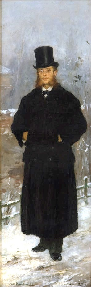 Portrait of Kazimierz Bartoszewicz